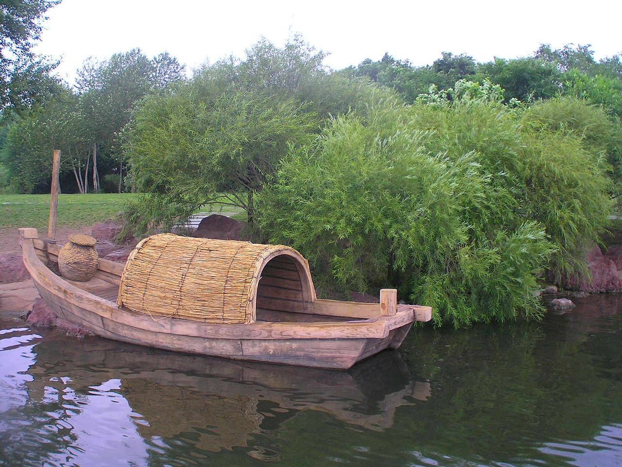 水閣雲天 1980年に着工し、1981年竣工。面積は約1515㎡。水閣雲天の命名は黒竜江省の元省長の陳雷による。2005年の3期改造工事の中で、この地区は中国風から洋風に改められた。水閣雲天の「水」は太陽湖という人工湖で、ハルビン市民が1980年メーデーの際に労働奉仕により造成した。太陽山は公園内でも主要な景観を形成している。また「閣」は、近代的な庭園の造景手法を採用し、洋風の建築とも融合し、シダレヤナギが湖面に投影する光景が岸辺に建つ東屋とともに見事な景観を織りなしている。